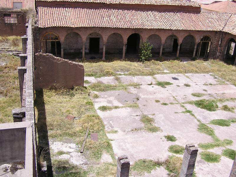 Claustro Mayor del desaparecido Convento San Agustín de Cuzco, donde hoy se levanta un hotel.